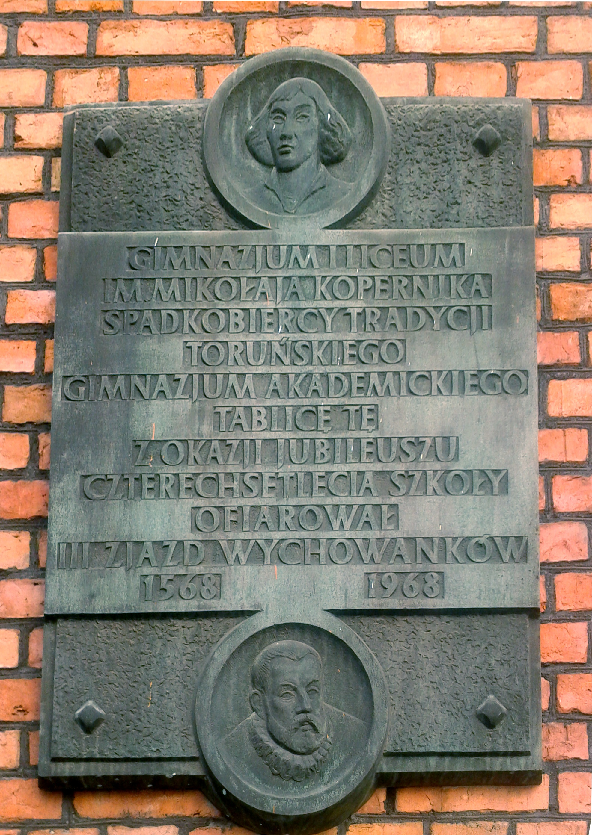 Tablica pamiątkowa na I Liceum Ogólnokształcącym w Toruniu imienia Mikołaja Kopernika - ulica Zaułek Prosowy 1, Toruń inskrypcja: Gimnazjum i Liceum/ imienia Mikołaja Kopernika/ spadkobiercy tradycji/ toruńskiego/ gimnazjum akademickiego/ tablice tę/ z okazji jubileuszu/ czterechsetlecia szkoły/ ofiarował/ III zjazd wychowanków/ 1568-1968 (oficjalna strona szkoły)